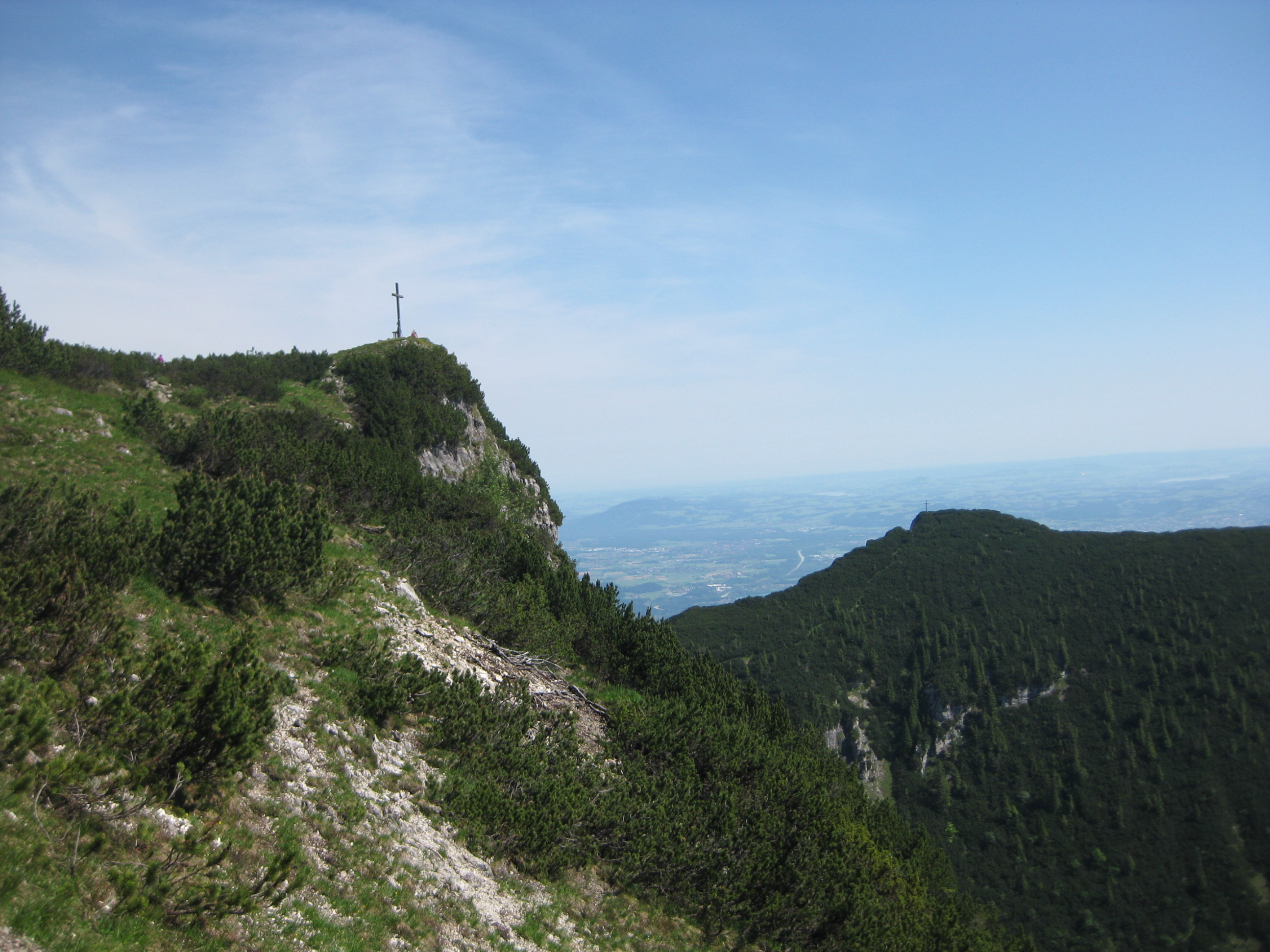 Blick auf den Karkopf. Im Hintergrund der Dreisesselberg.